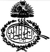 Naser al-Din Shah stamp